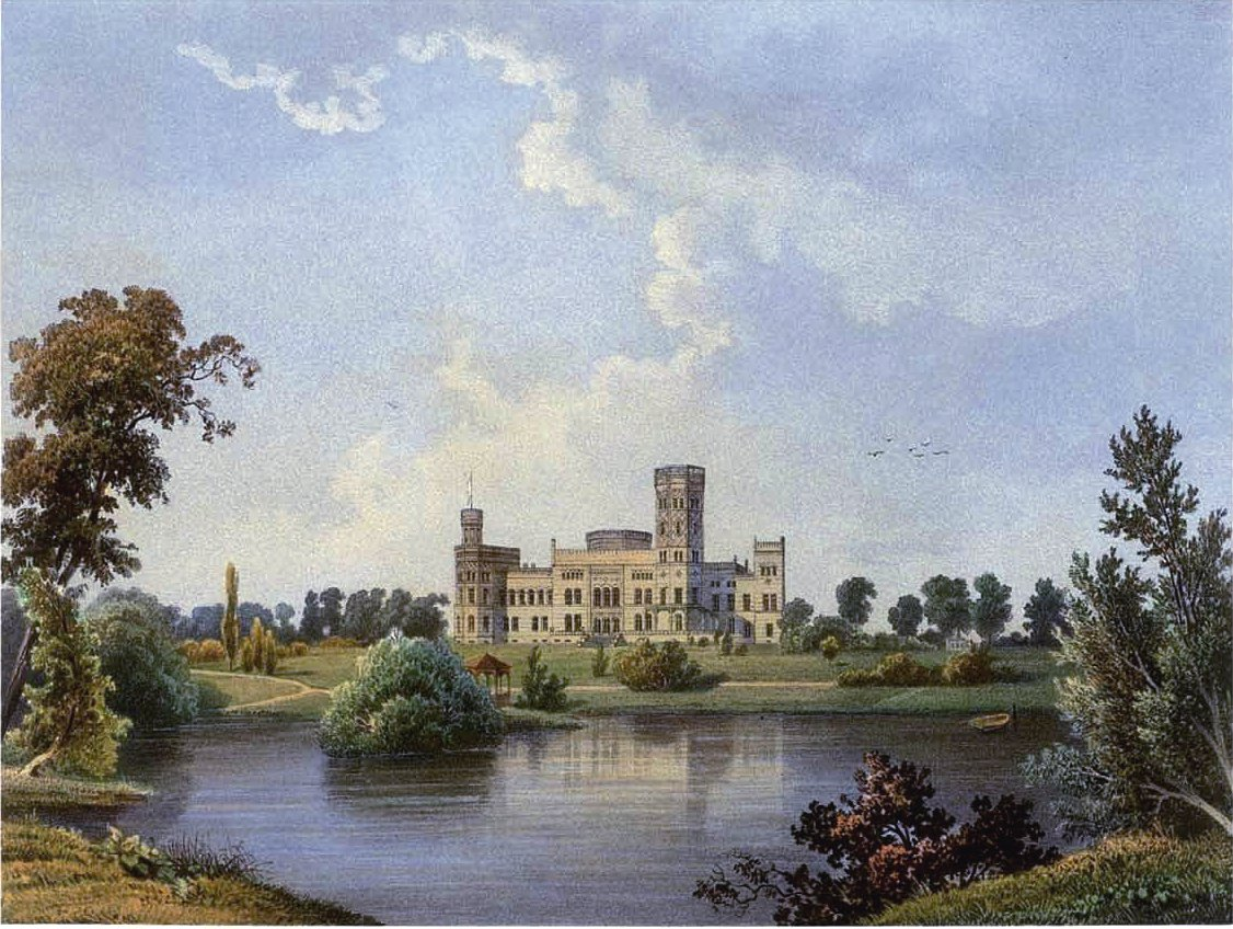 Schloss Neetzow, Lithografie aus dem 19. Jahrhundert